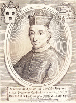 Alfonso Fernández de Córdoba, o Alfonso Aguilar, cardenal español al servicio de Carlos II de España.